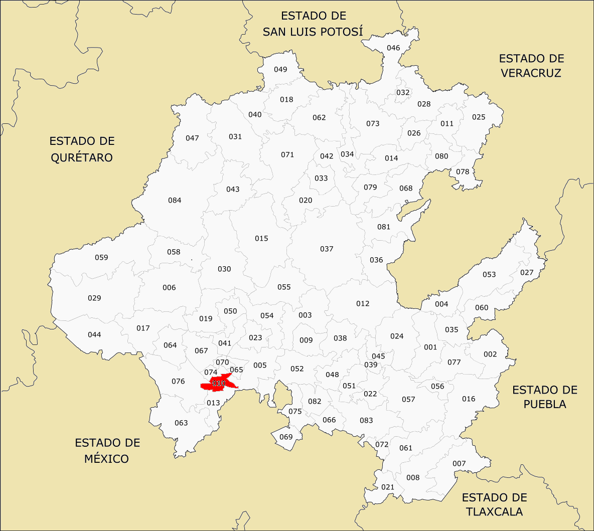 Municipio de Hidalgo